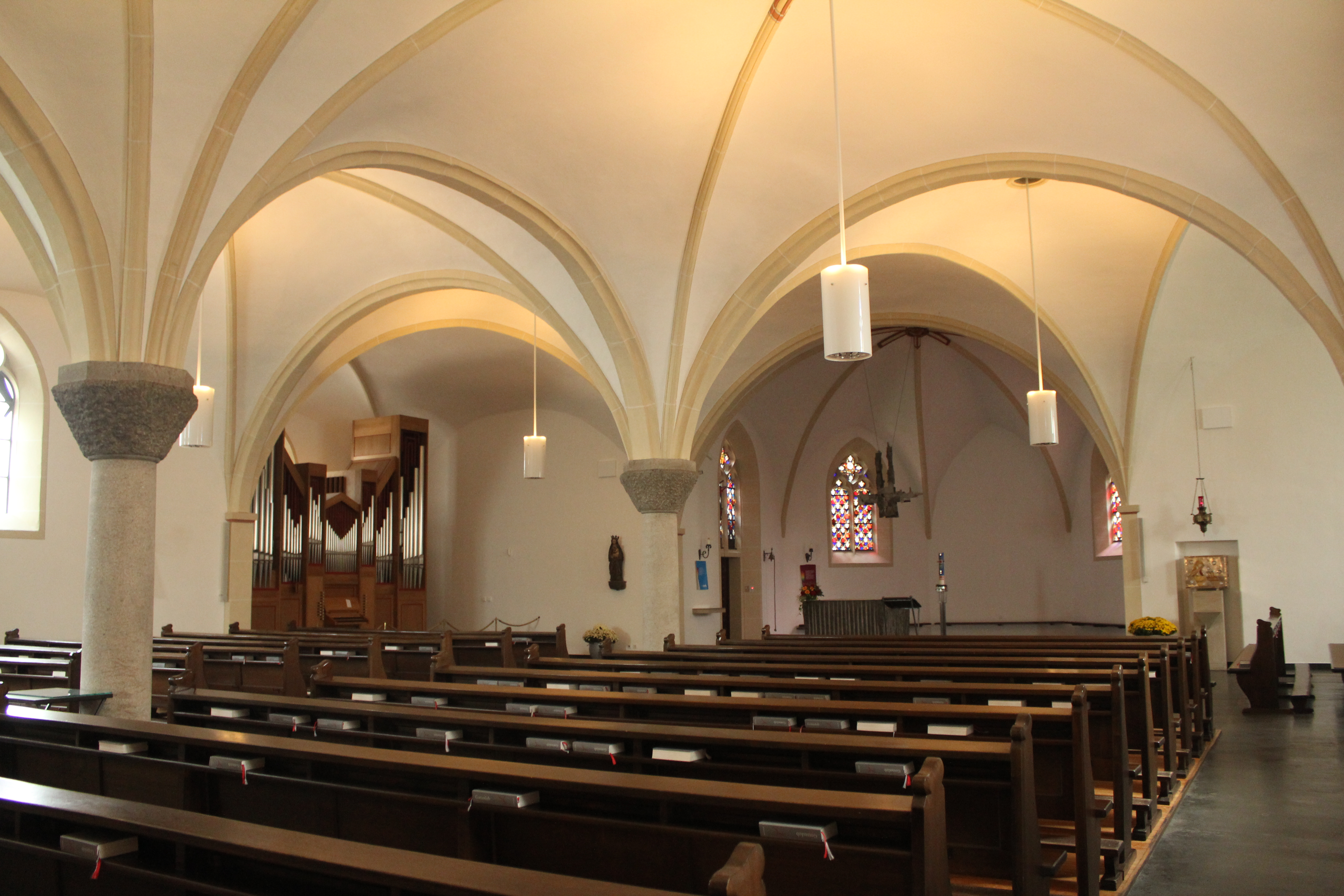 Innenansicht von St. Josef Kinderhaus, Gesamtübersicht. Detail Altarraum: File:Sankt Josef Kinderhaus - Altarraum.jpg Detail Orgel: File:Sankt Josef Kinderhaus - Orgel.jpg Detail rechtes Seitenschiff: File:Sankt Josef Kinderhaus - rechtes Seitenschiff.jpg